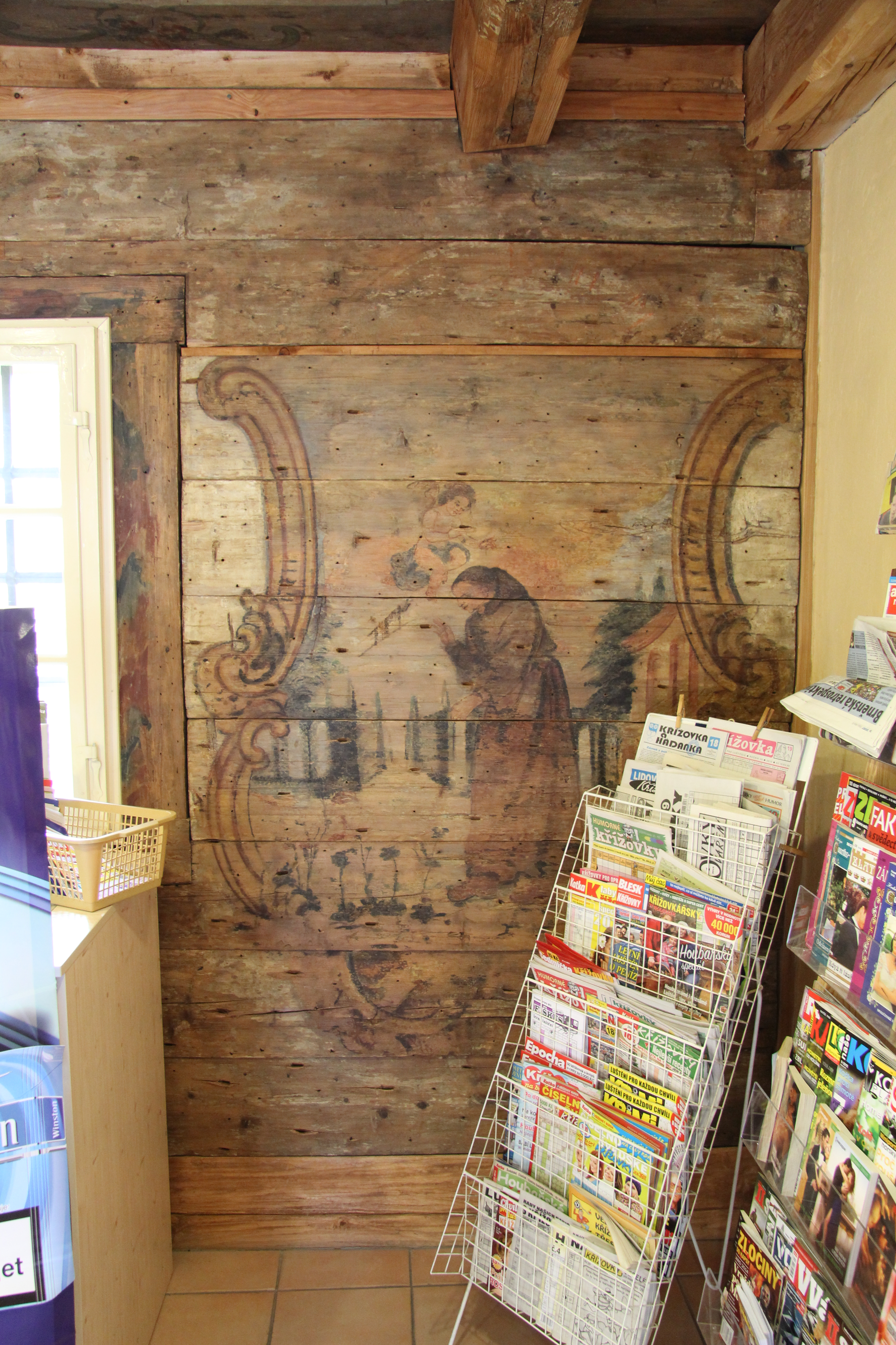 Bývalý františkánský klášter v Hořovicích, dnes trafika